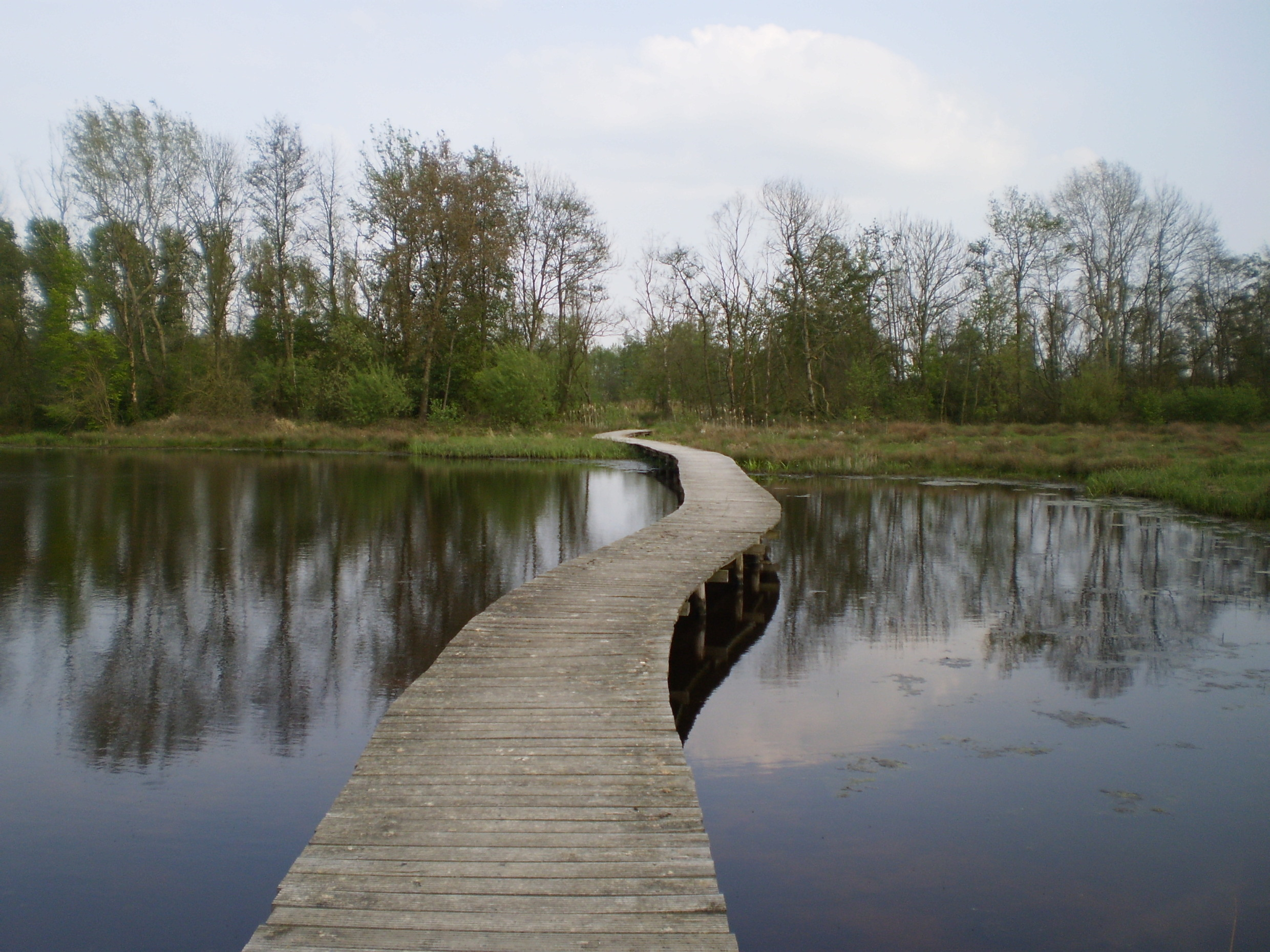 Beekbergerwoud near Apeldoorn (3)